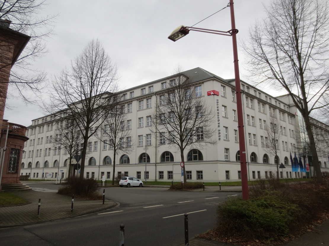 Kulturdenkmal Chemnitz/Altchemnitz.